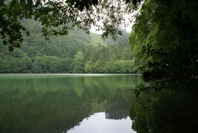 Lagoa do Congro, sombras, Ilha de São Miguel, Arquipélago dos Açores, Portugal.